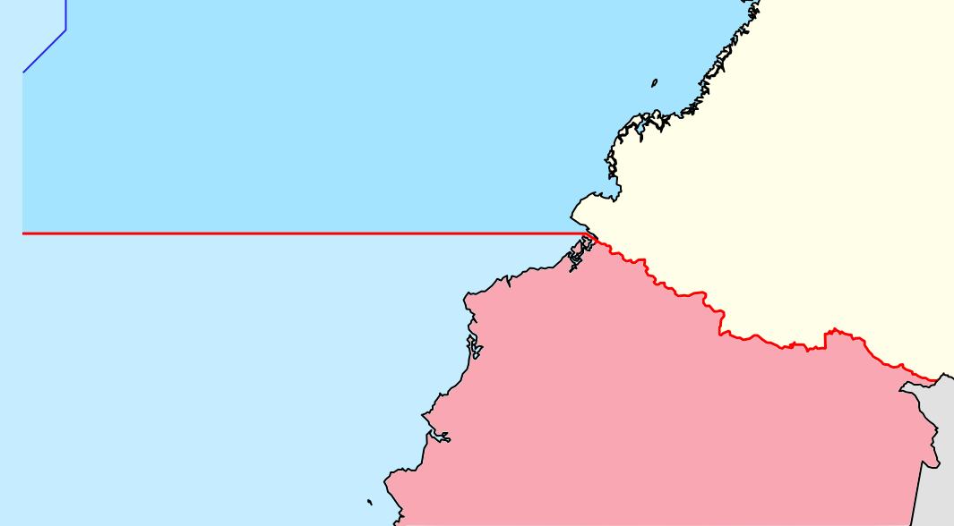 Frontière Colombie-Equateur